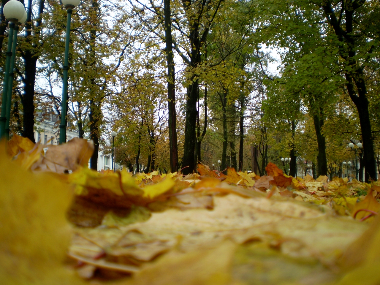 Восень...